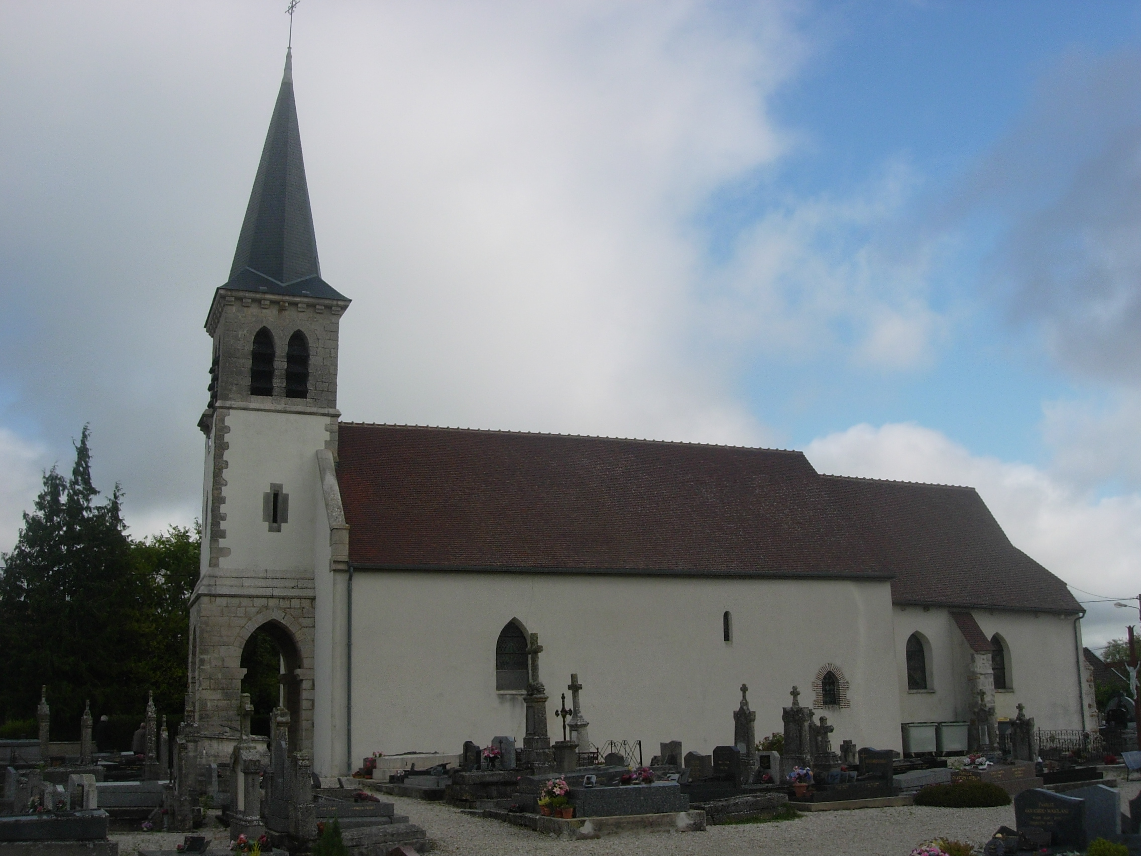 Eglise d'Ossey-les-Trois-Maisons